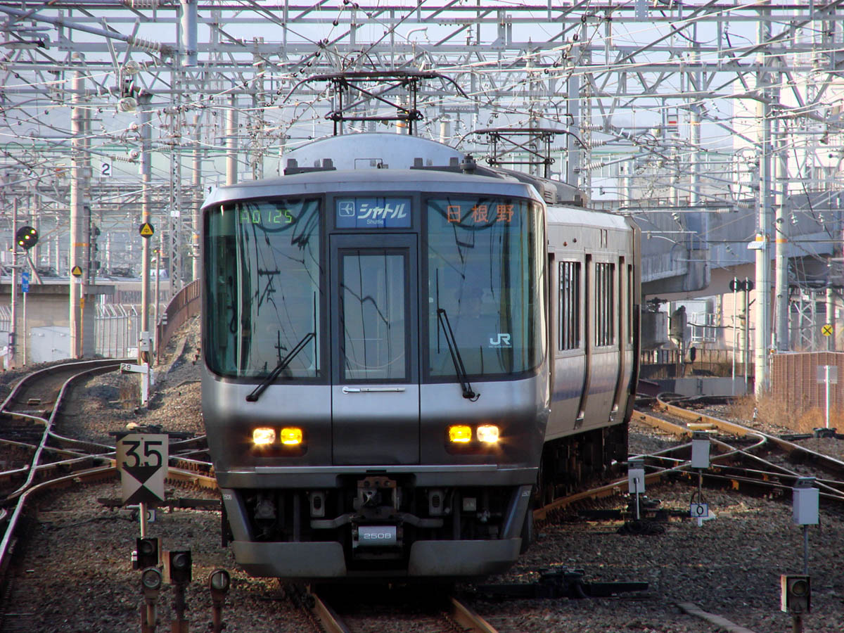 JR西日本 関西空港線 シャトル